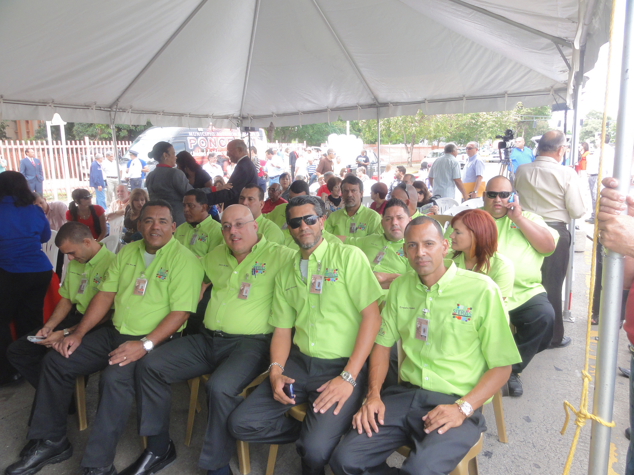 SITRAS conductores, Ponce, Puerto Rico